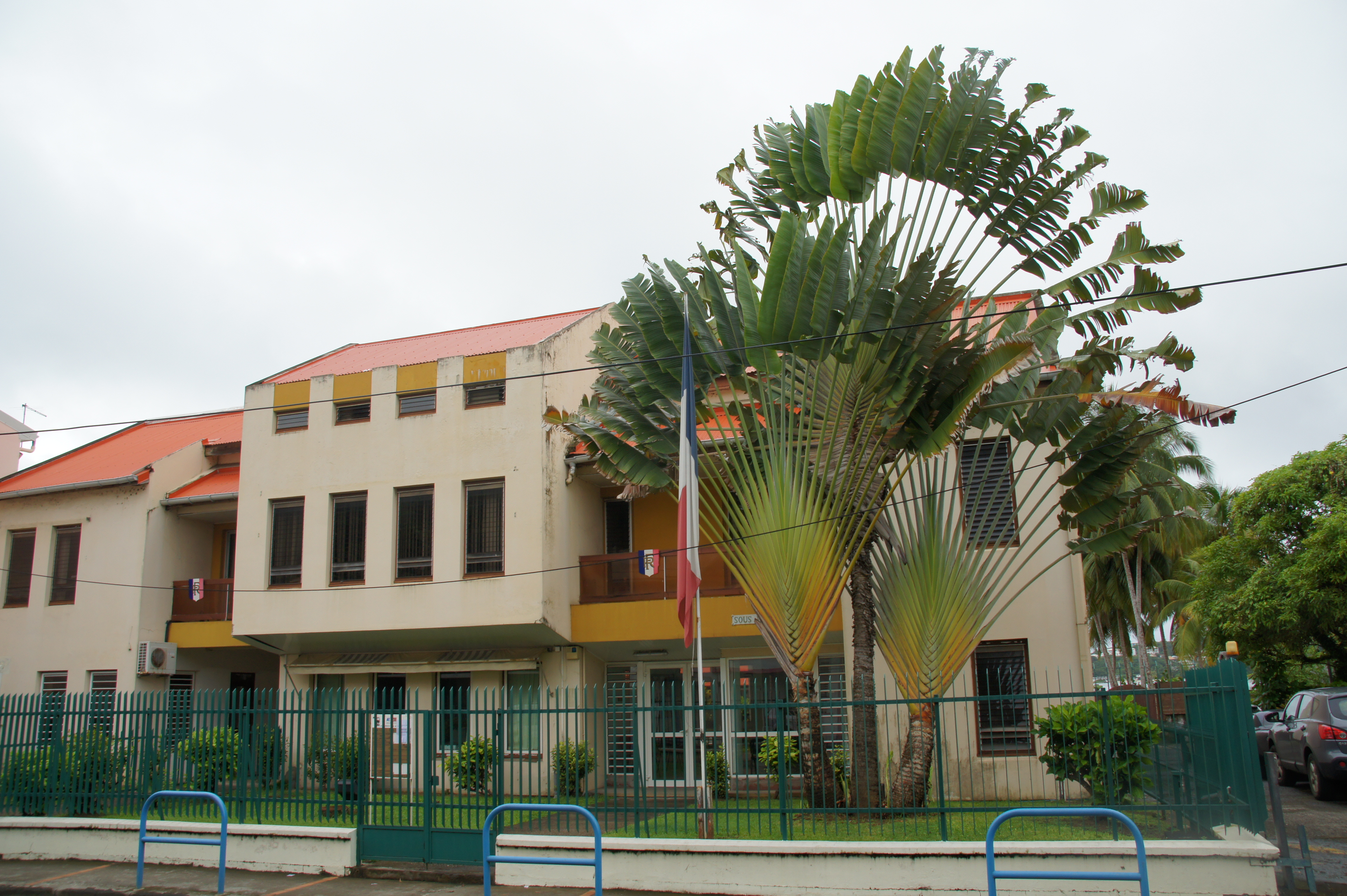 Sous-préfecture de La Trinité